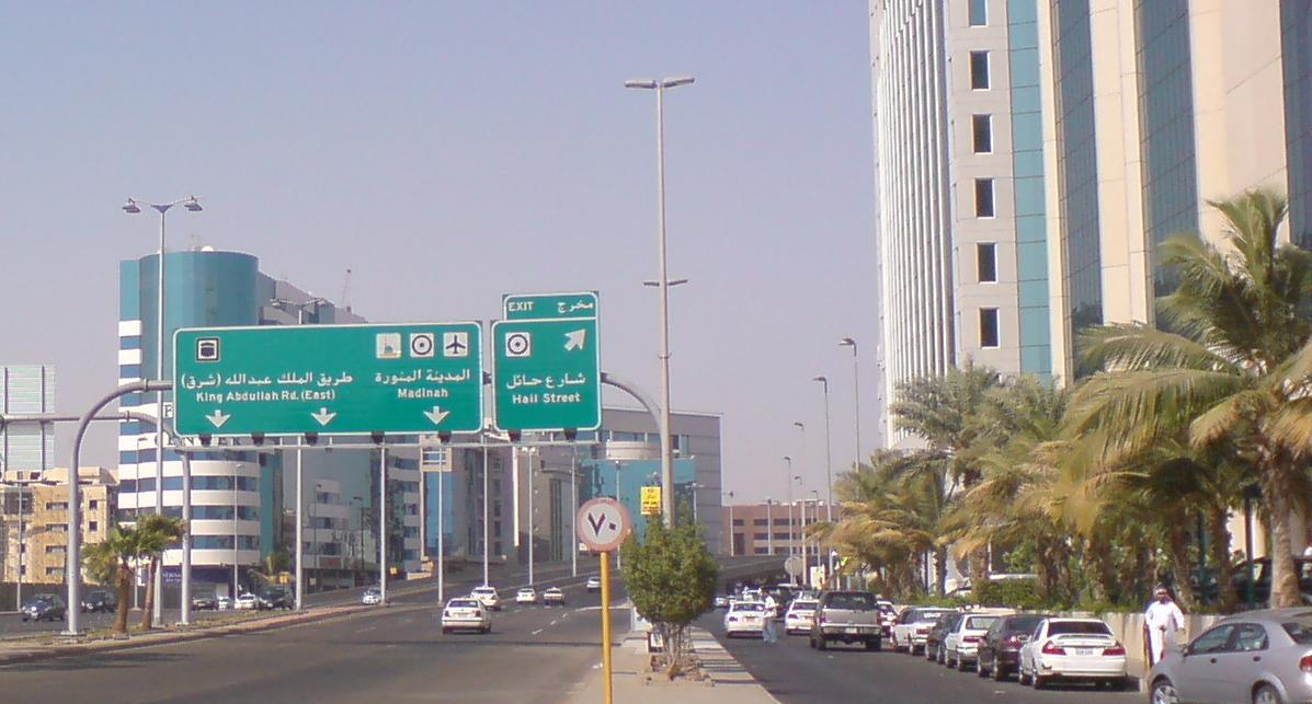 King Abdullah St. - Jeddah